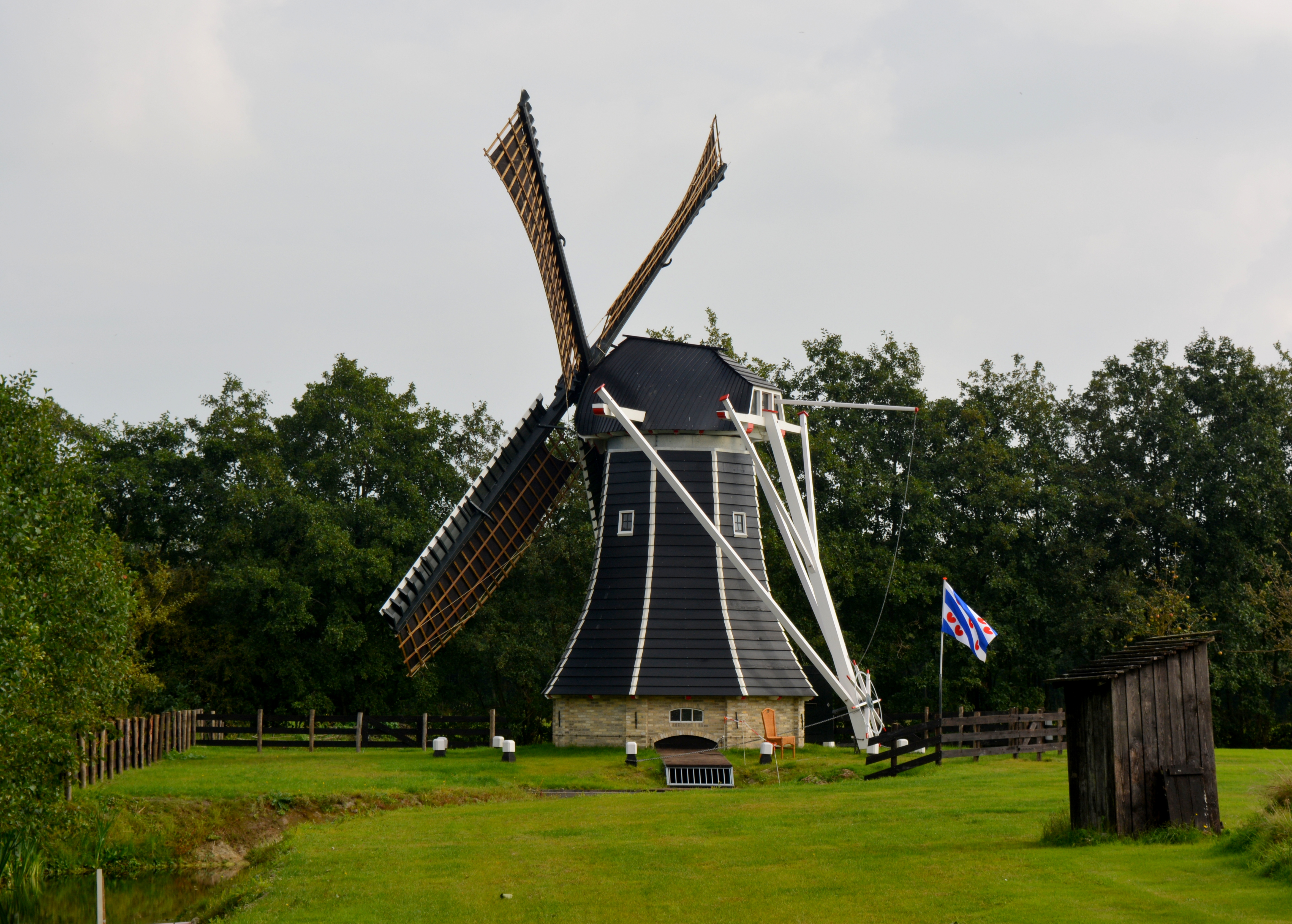 Damwâld, molen de Meermeermin